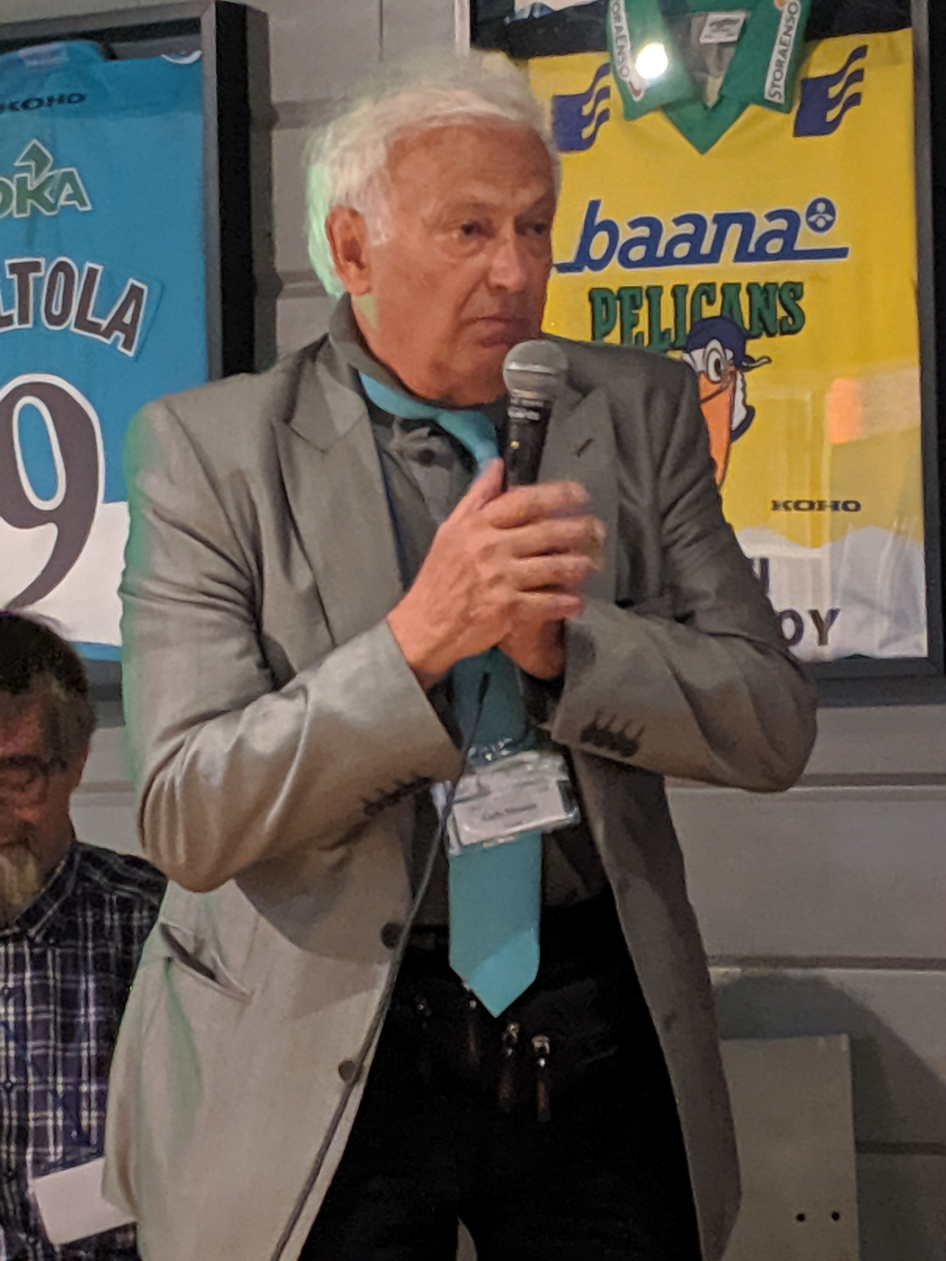 Carlo Minnaja dum UK 2019